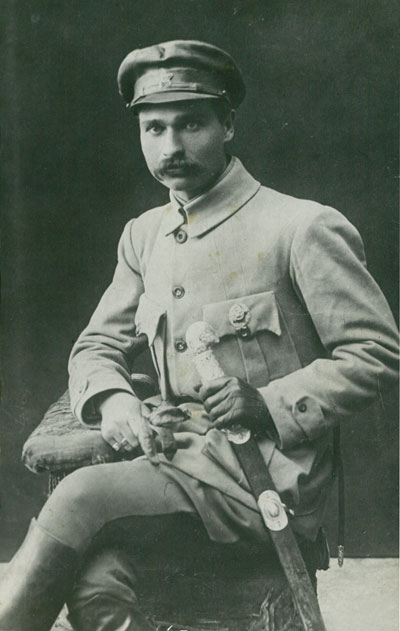 Командир 2-го Богунського полку 44-ї Київської стрілецької дивізії Михайло Петрович Кирпонос, 1919 рік